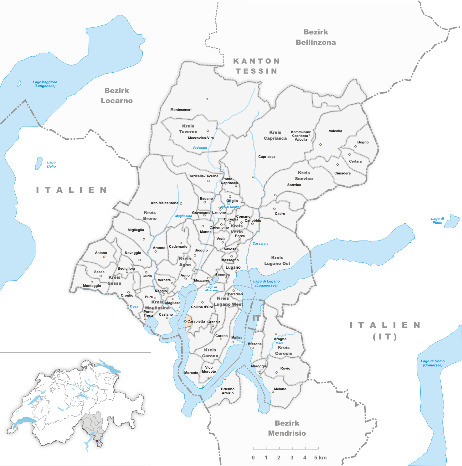 Municipality Carabietta